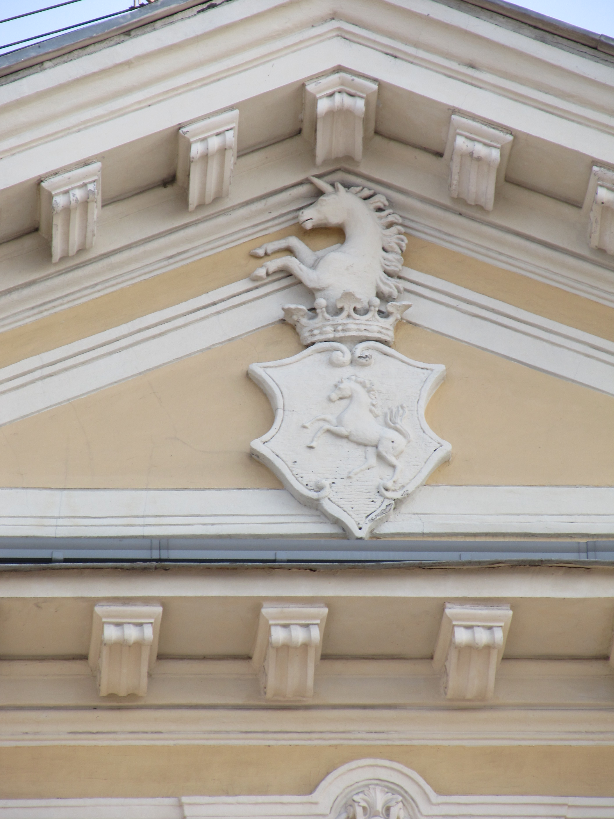 Домовладение купца Челышева, Санкт-Петербург, Английская наб., 26/Галерная ул., 25